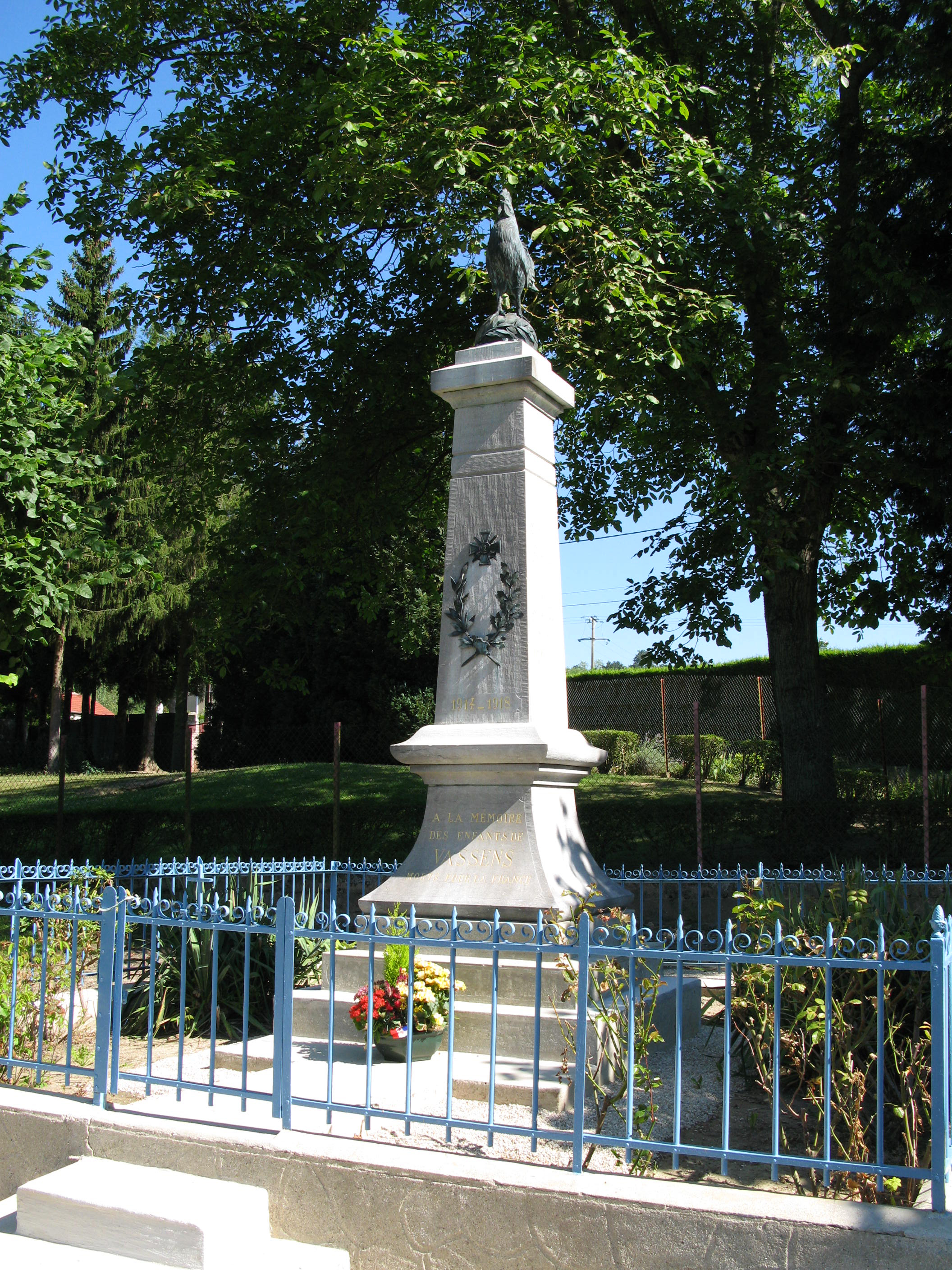 Vassens (Aisne, France) - Le monument-aux-morts. .